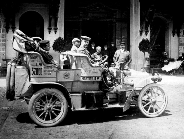 Martini 16HP Tonneau, am Steuer H.H.P. Deasy